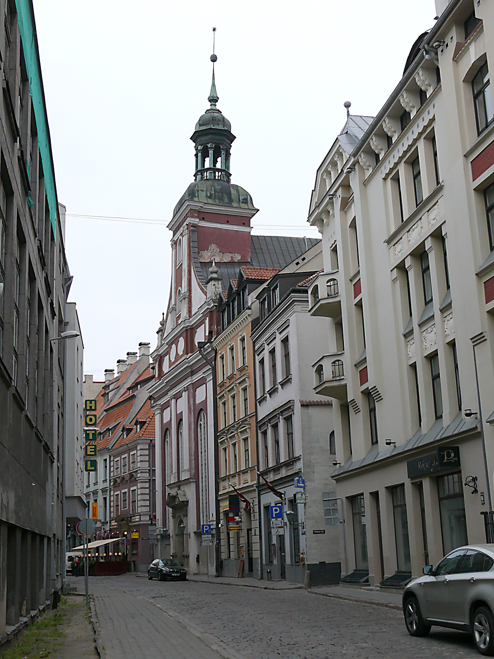 Реформатская церковь на улице Марсталю в Старой РигеLatviešu: Rīgas Reformātu baznīca. Skats no Kungu un Mārstaļu ielu stūra.